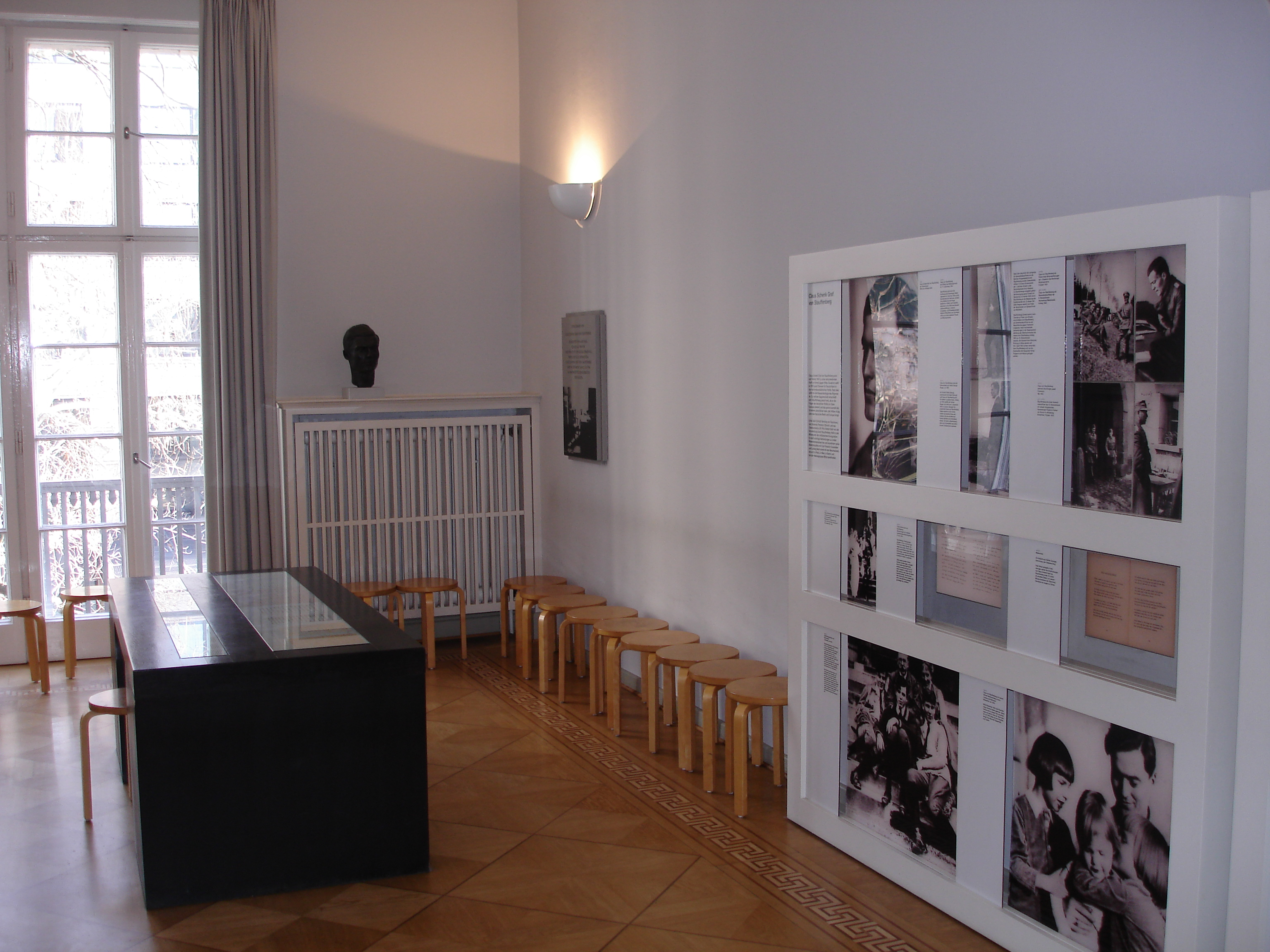 Stauffenberg's office at Bendlerstrasse